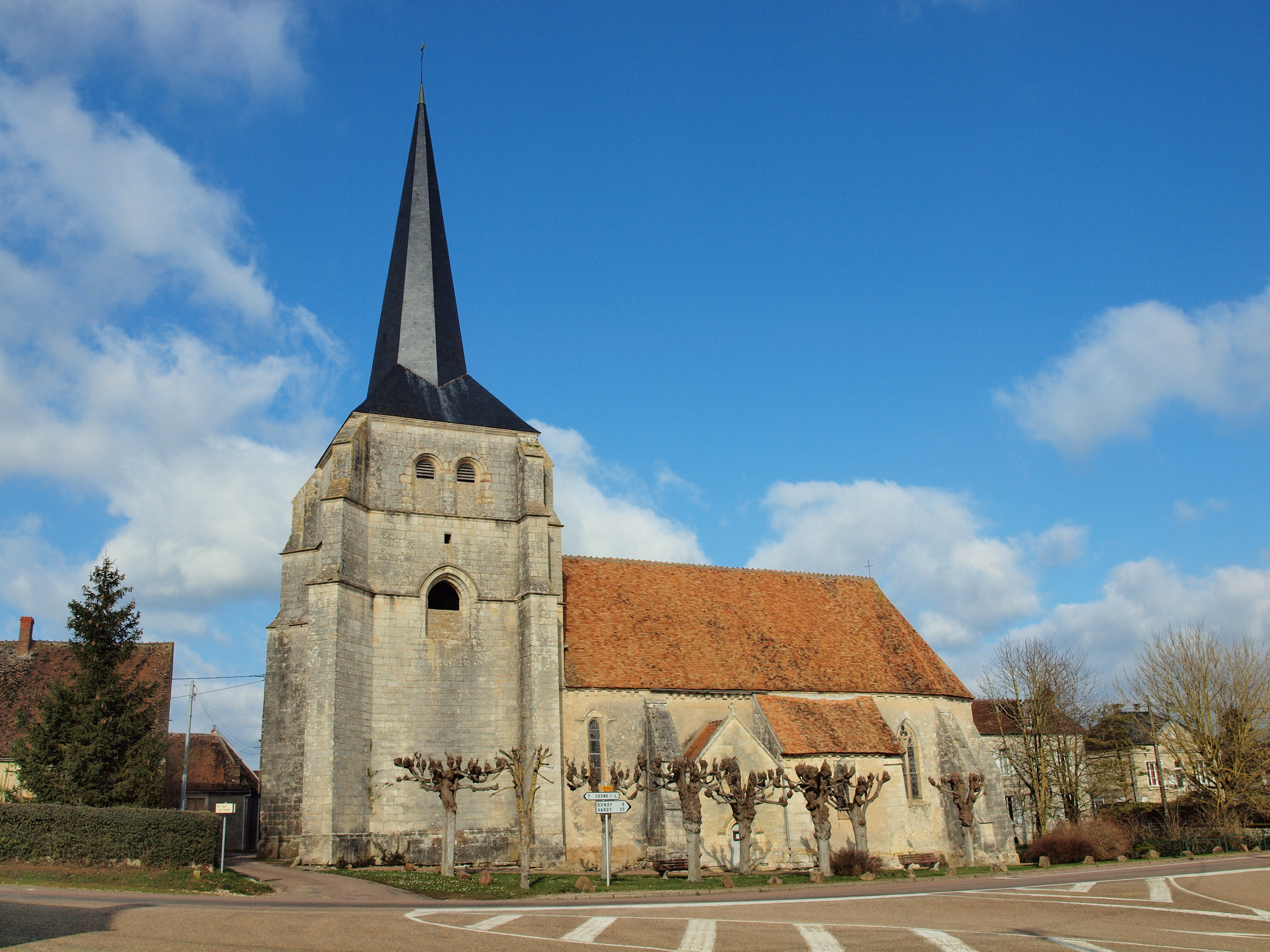 Église Saint-Vincent de Pougny (Nièvre, France)